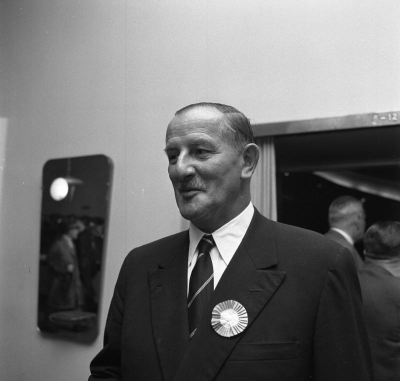 79. Deutscher Katholikentag in Hannover Windthorst-Feier im Film-Theater am Aegi Fürst zu Löwenstein